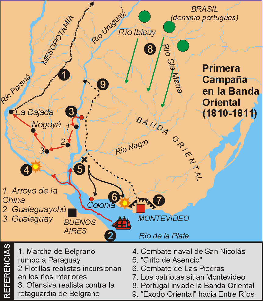 Operaciones militares en la Banda Oriental (1ª Campaña, 1810-11) - Military actions in Banda Oriental (today Uruguay, 1810-1811)